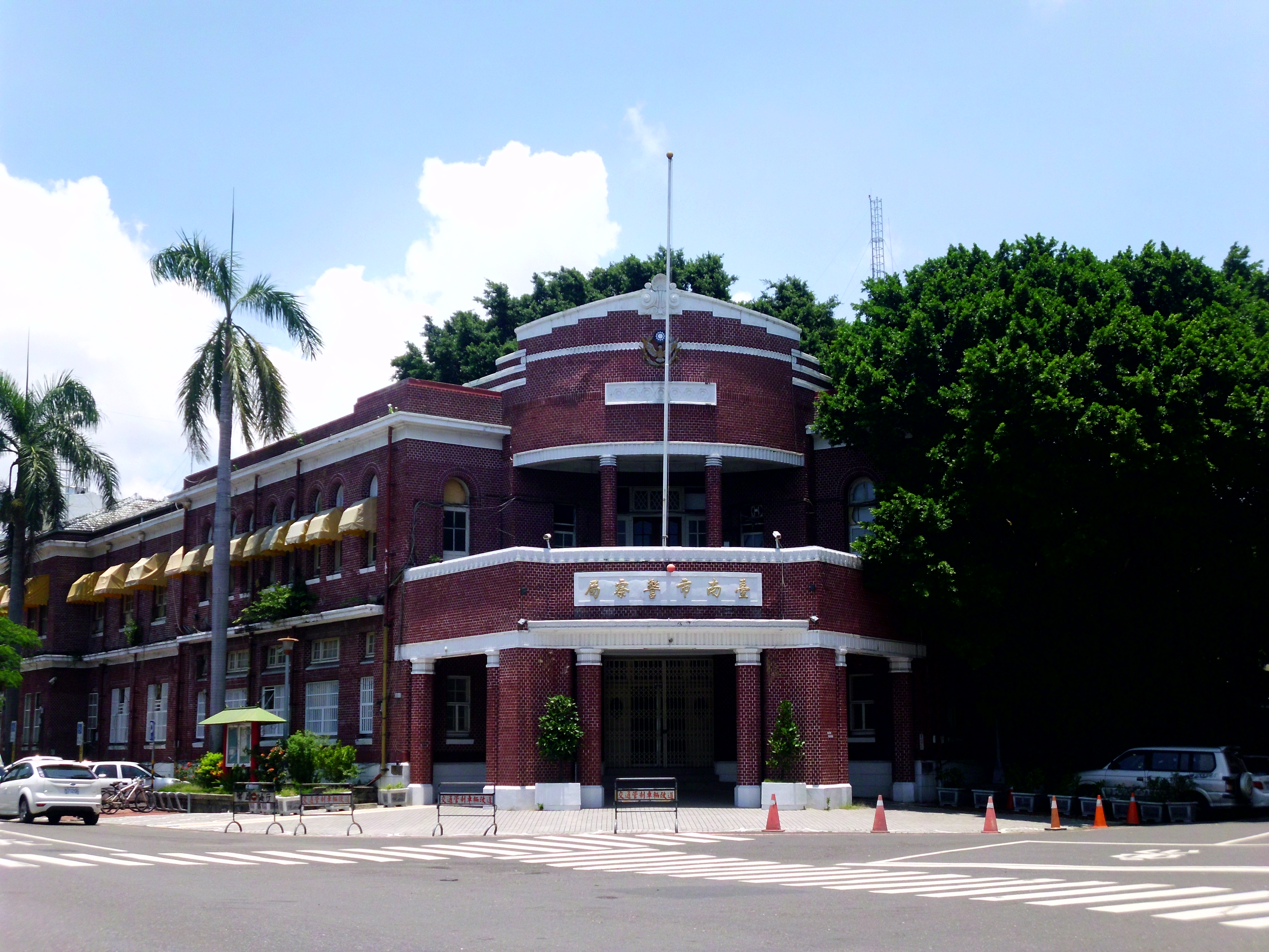 原台南市警察局